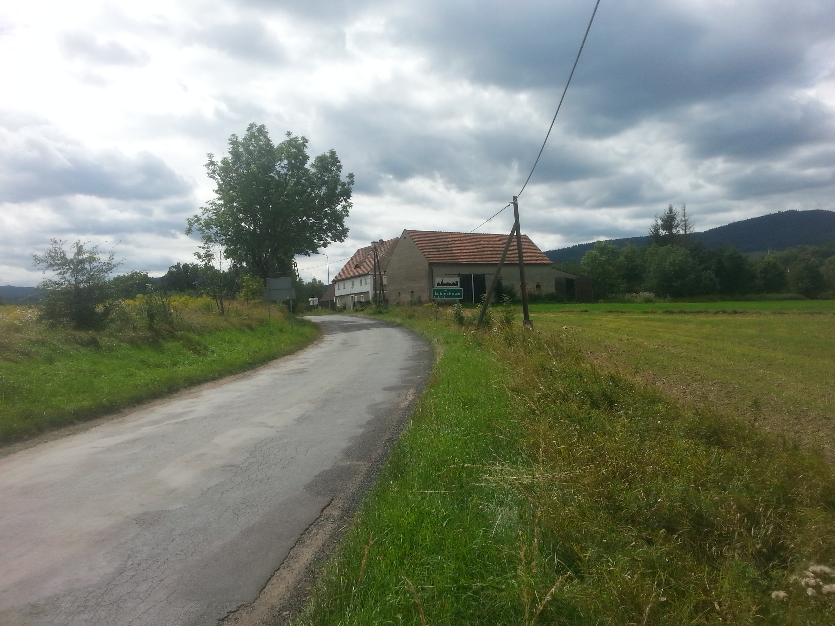 Het Poolse plaatsje Lubiechowa tijdens vakantie.